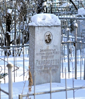 В.В.Ревердато захоронение